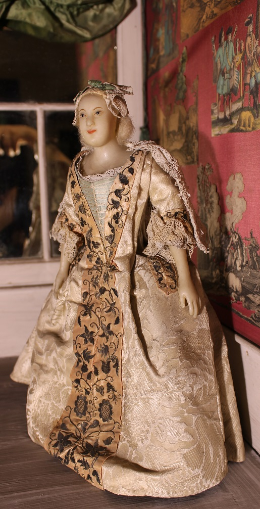 Arnstadt, Neues Palais - Detail, adelige Dame